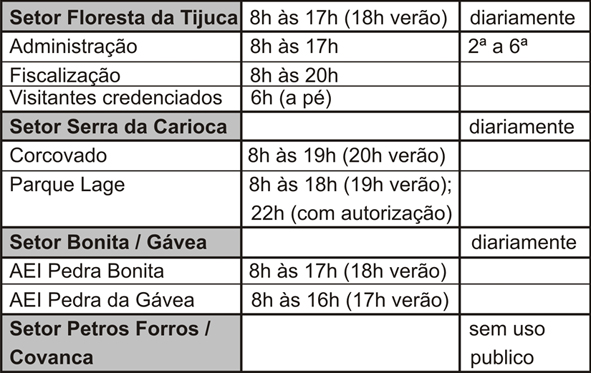 Tabela de Horários PNT